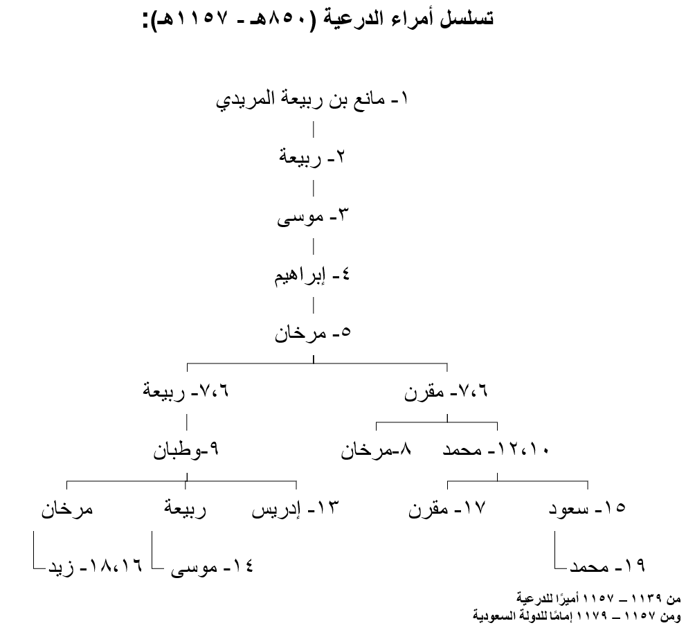 تسلسل أمراء الدرعية (850-1157هـ.)